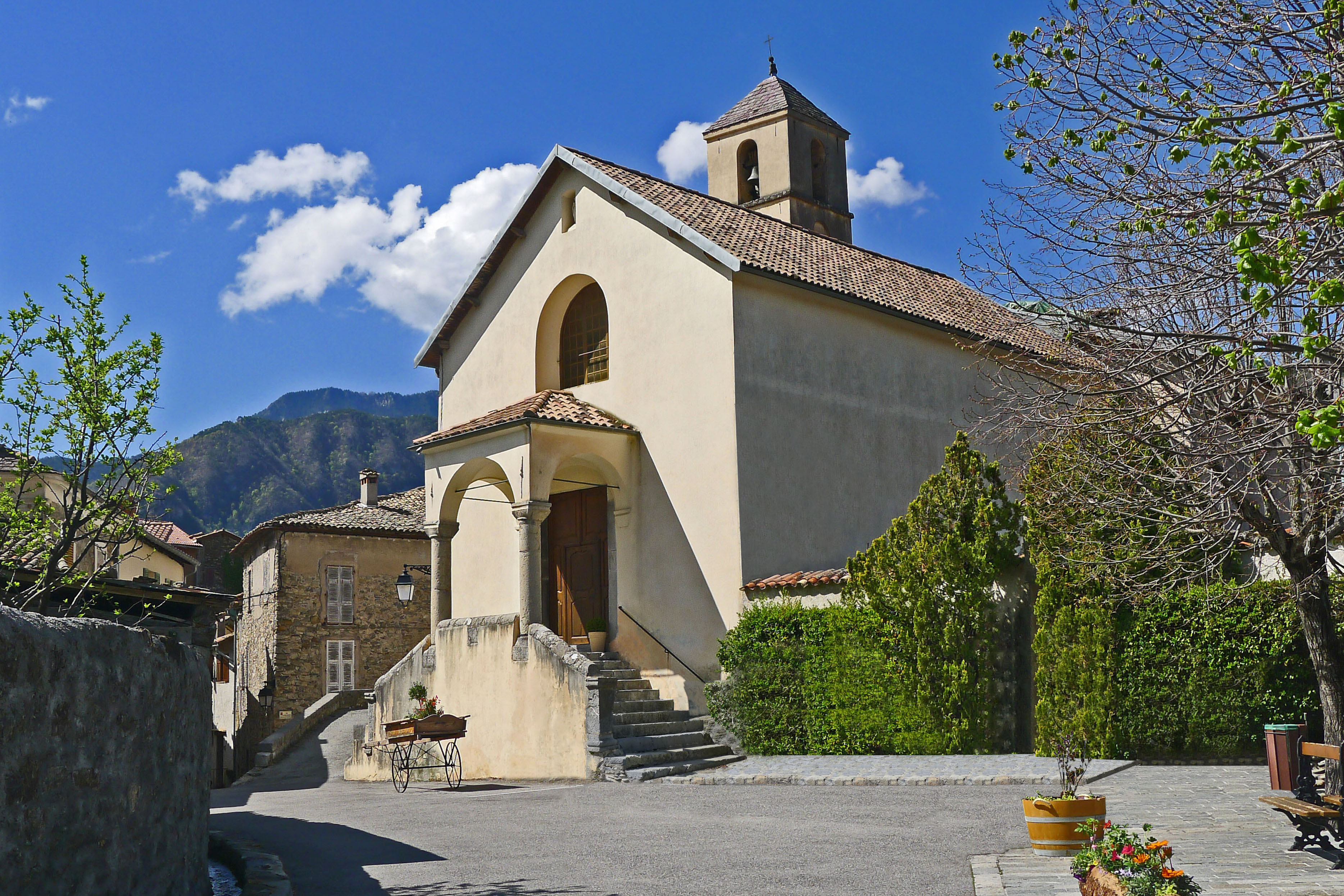 L’église Saint-Pons de Marie.